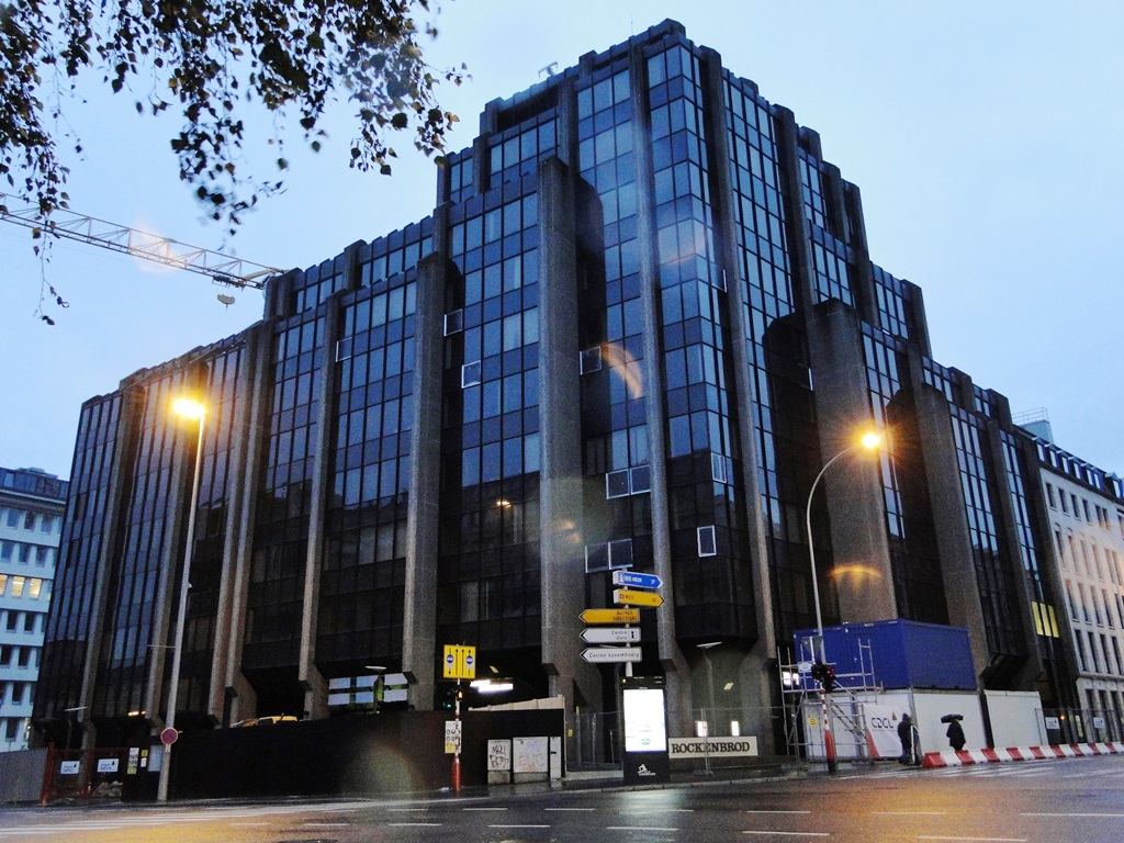 complexe administratif Carrefour (11.2014)